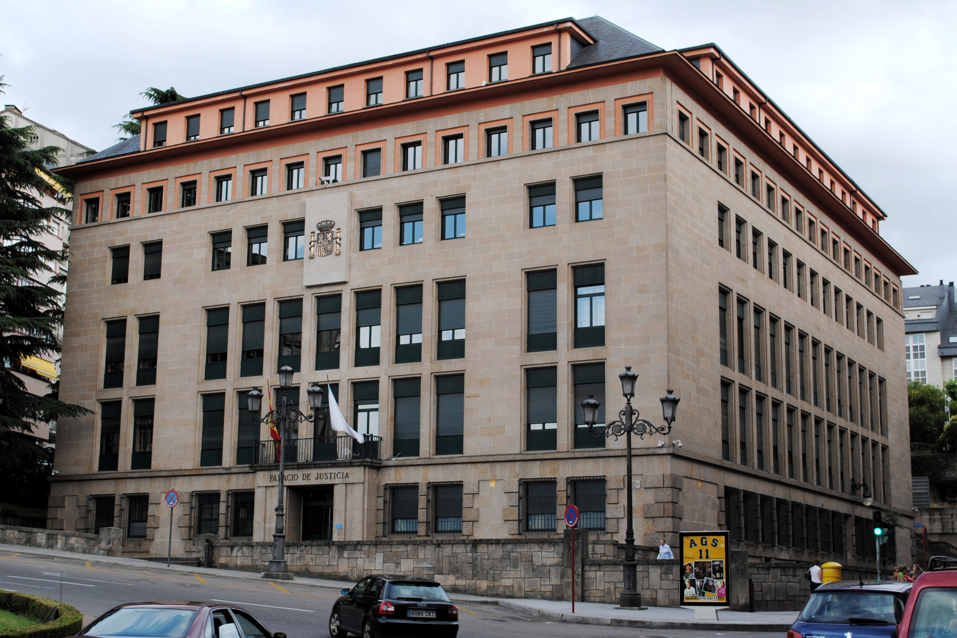 see title